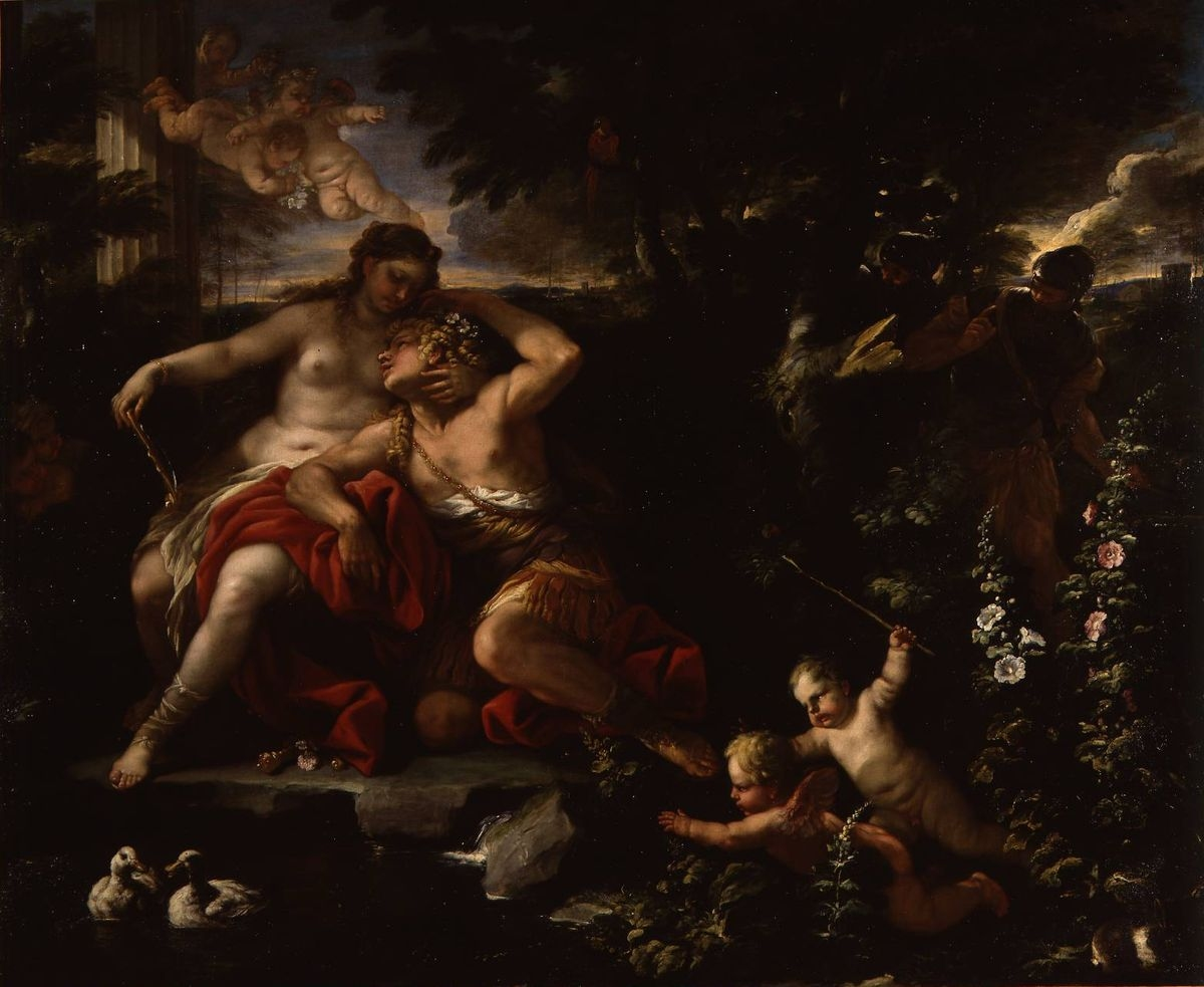 Peinture